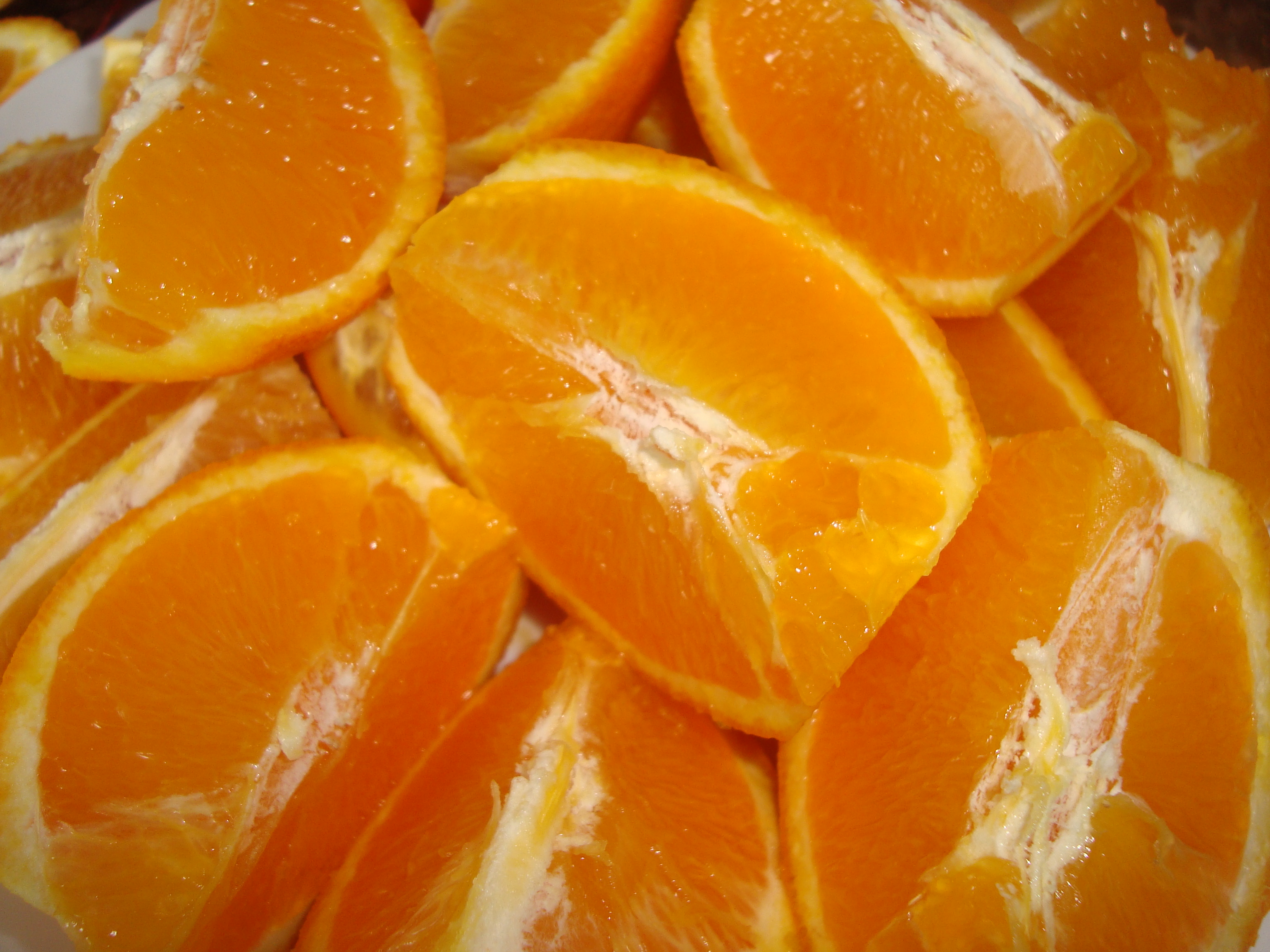 Naranjas